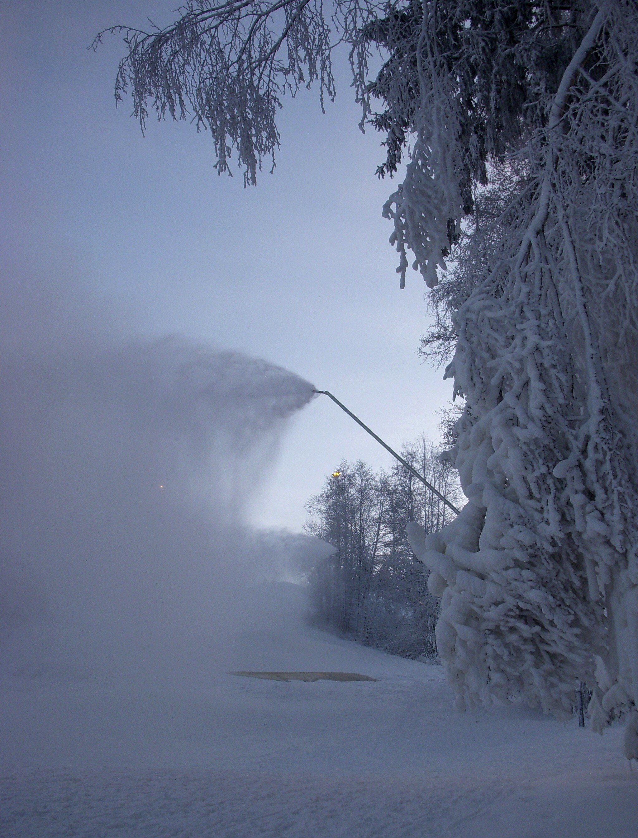 Snökanon av typ snölans på Flottsbrobacken i Stockholm